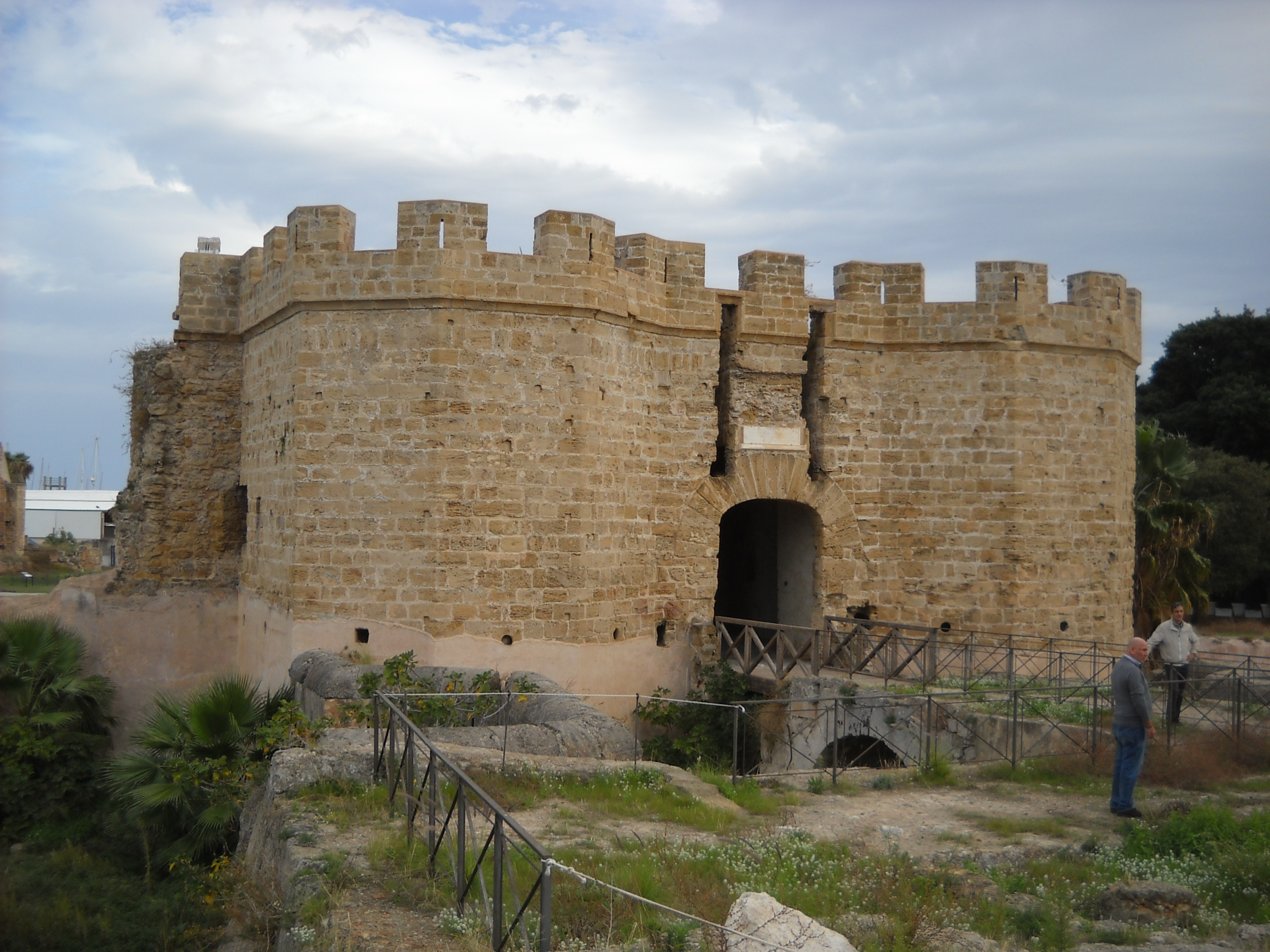 Castello a mare di Palermo fronte corpo fabbrica principale